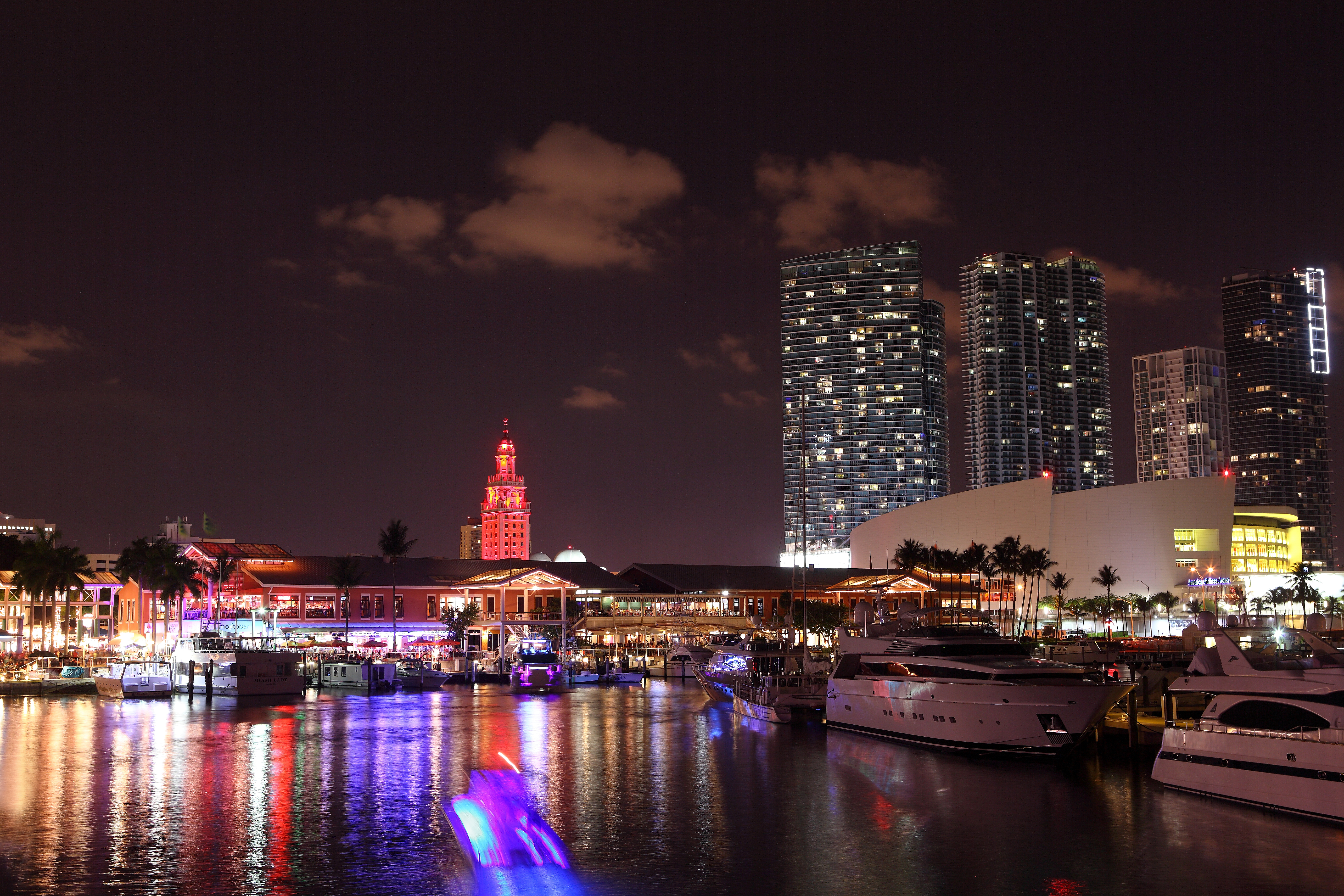 Das Foto ist eine Nachtaufnahme vom Port of Miami, rechts im Bild zu sehen ist die American Airline Arena.